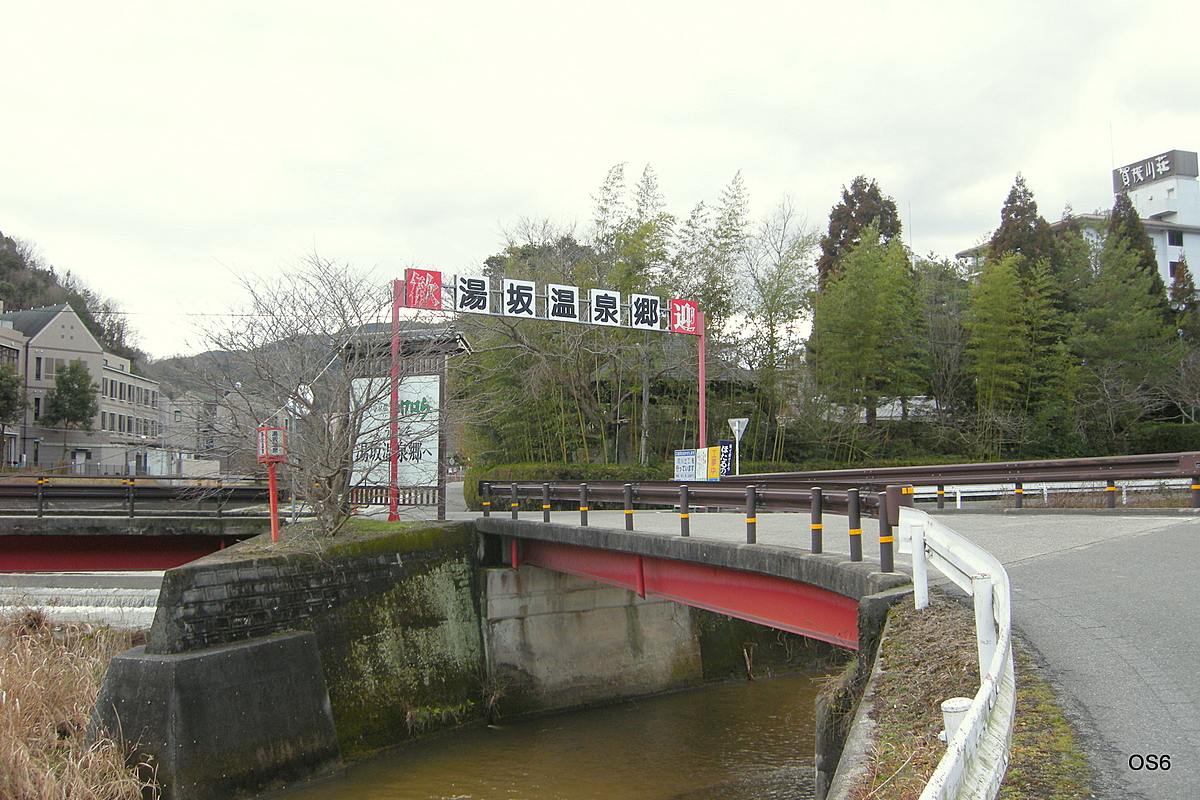 竹原市の湯坂温泉郷